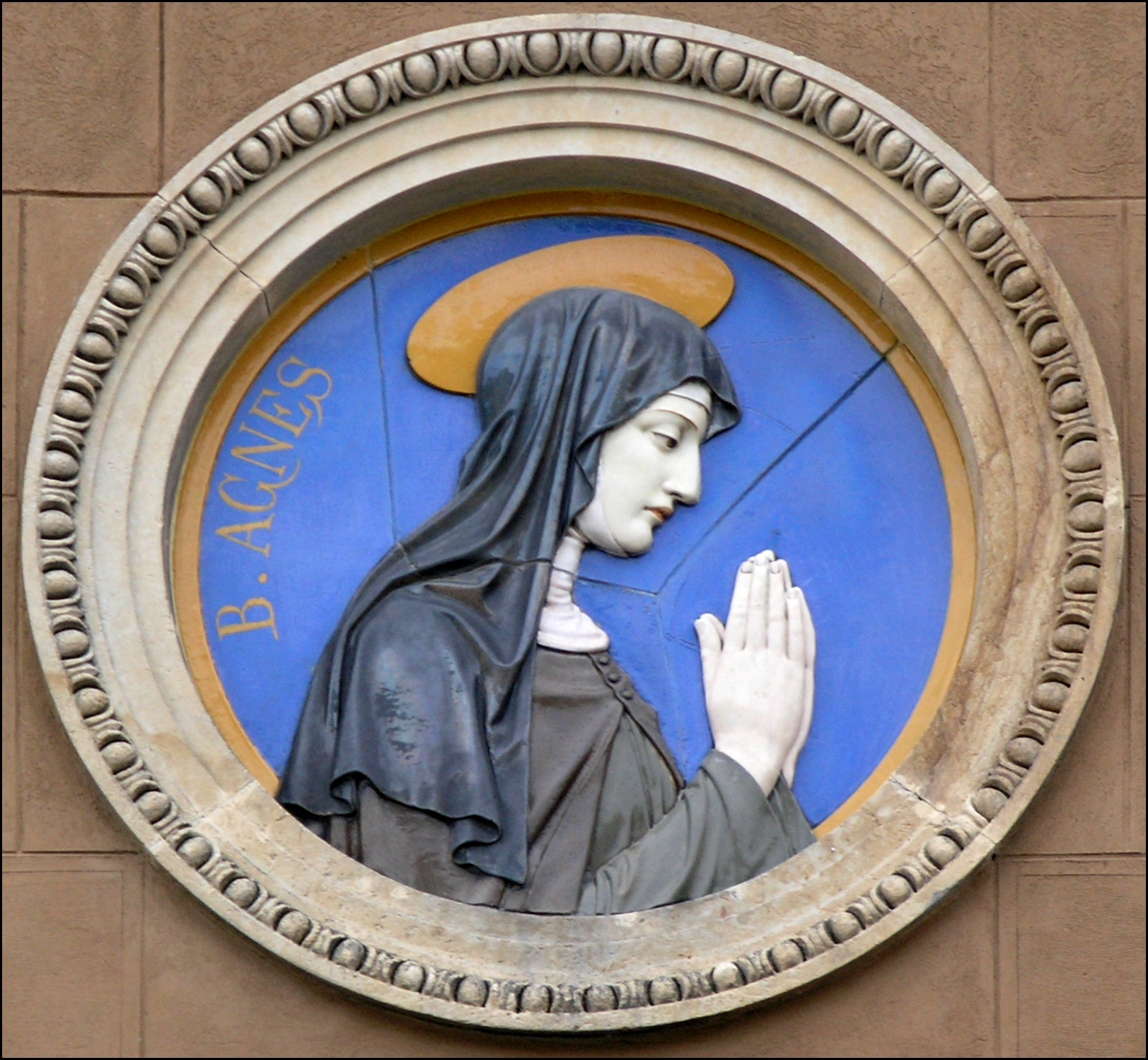 Kostel svatého Václava (Smíchov) - detail